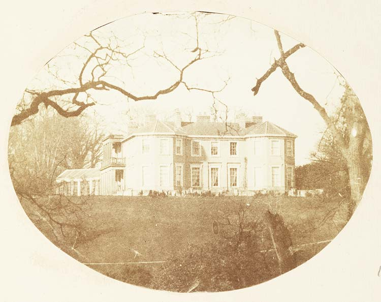 Ffotograffydd/Photographer: John Dillwyn Llewelyn (1810-1882) Nodyn/Note: Penllergare house. Original negative cut to this size and shape. Dyddiad/Date: c. 1852 Cyfrwng/Medium: Print taken from a calotype negative. Cyfeiriad/Reference: dil00004 (pb08732/01) Rhif cofnod / Record no.: 3590003 Rhagor o wybodaeth am Ffotograffiaeth Gynnar Abertawe yn Llyfrgell Genedlaethol Cymru More information about Early Swansea Photography at the National Library of Wales